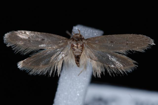 Holcocera chalcofrontella